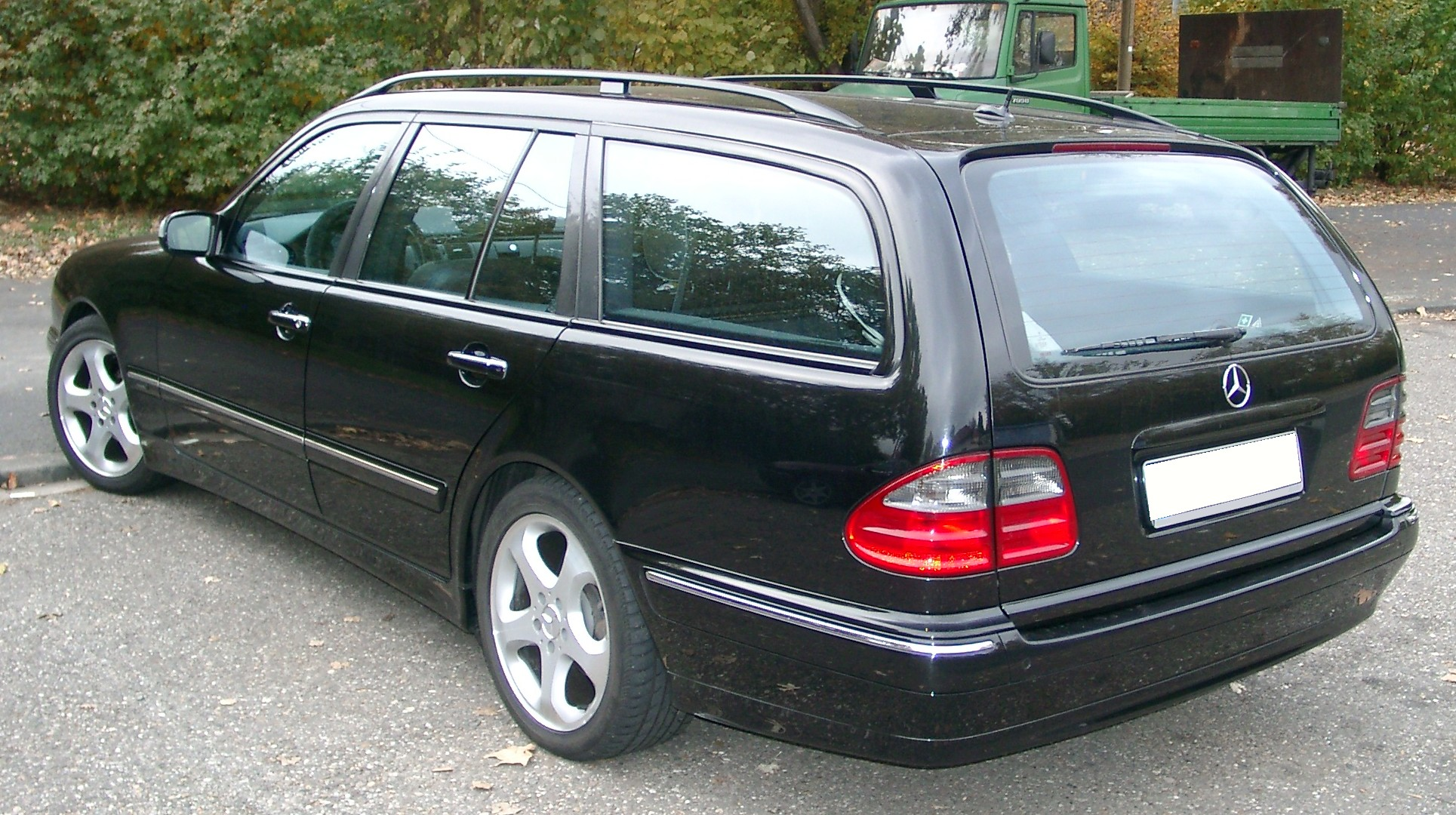 Mercedes-Benz S210 (T-Modell)